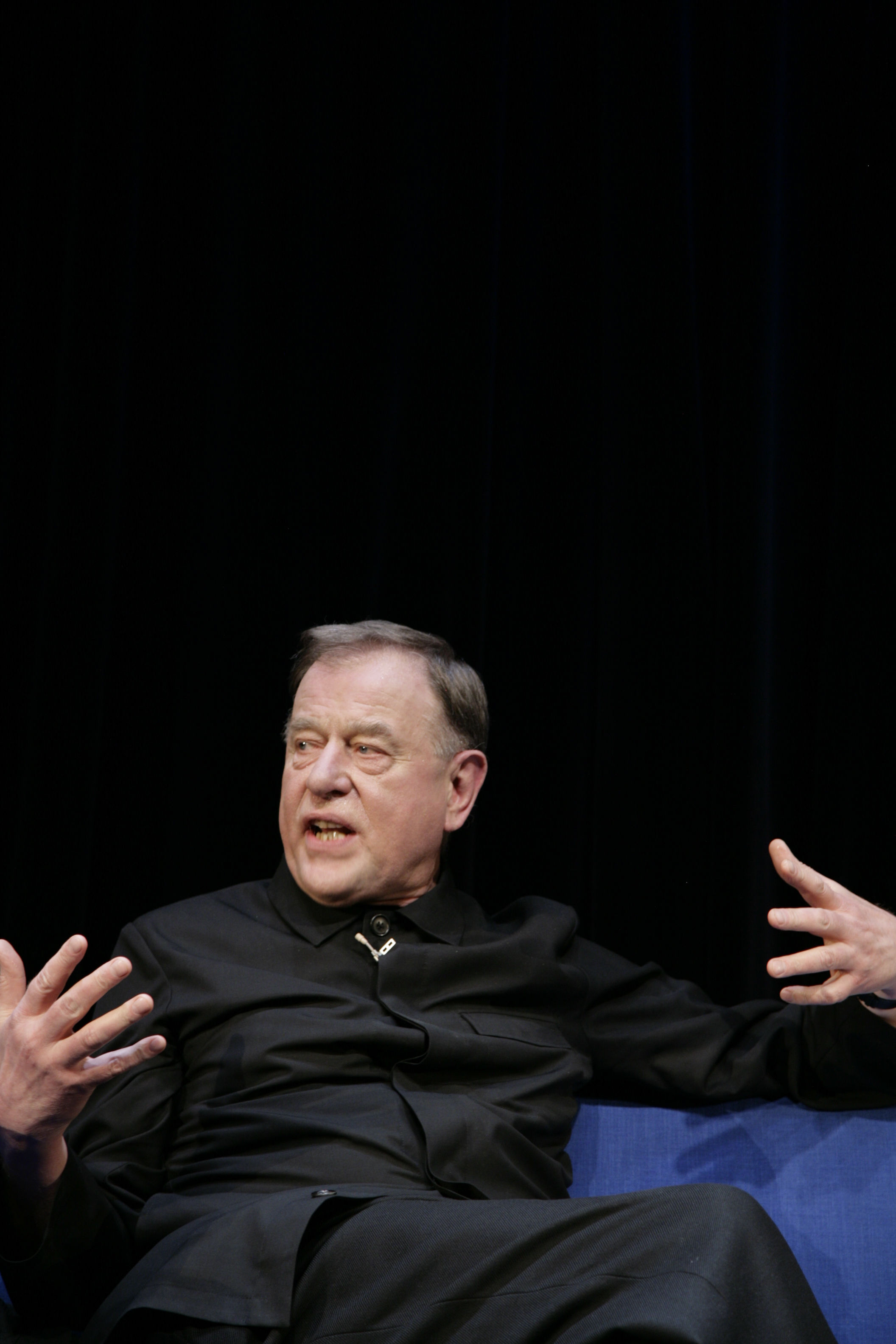 Moral – Macht - Mut Dietrich Bonhoeffer zum 100. Geburtstag Götz Aly, Klaus von Dohnanyi, Joachim Gauck, Bischof Wolfgang Huber, Ricarda Junge und Claus Peymann im Gespräch mit Wolfgang Herles 6. Februar 2006, 20 Uhr, auf dem Blauen Sofa im Berliner Ensemble